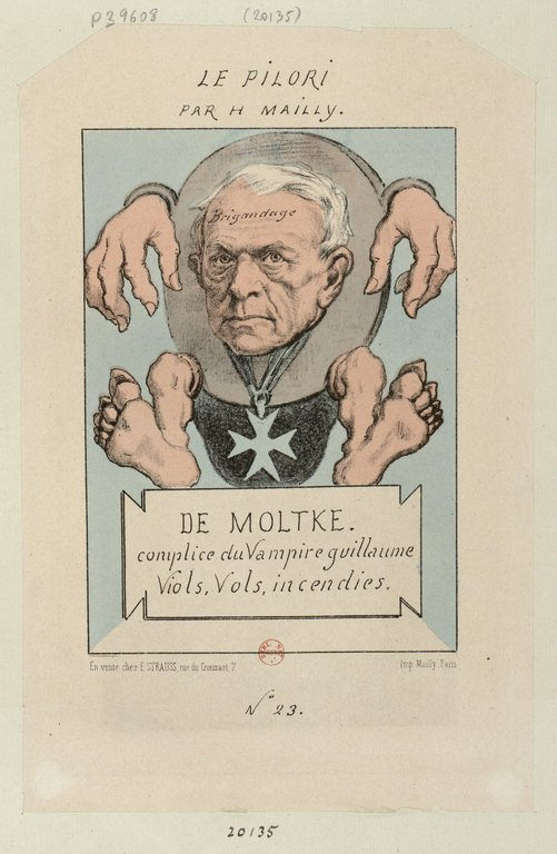 Le général von Moltke cloué au pilori, complice du vampire Guillaume, viols, vols et incendies.